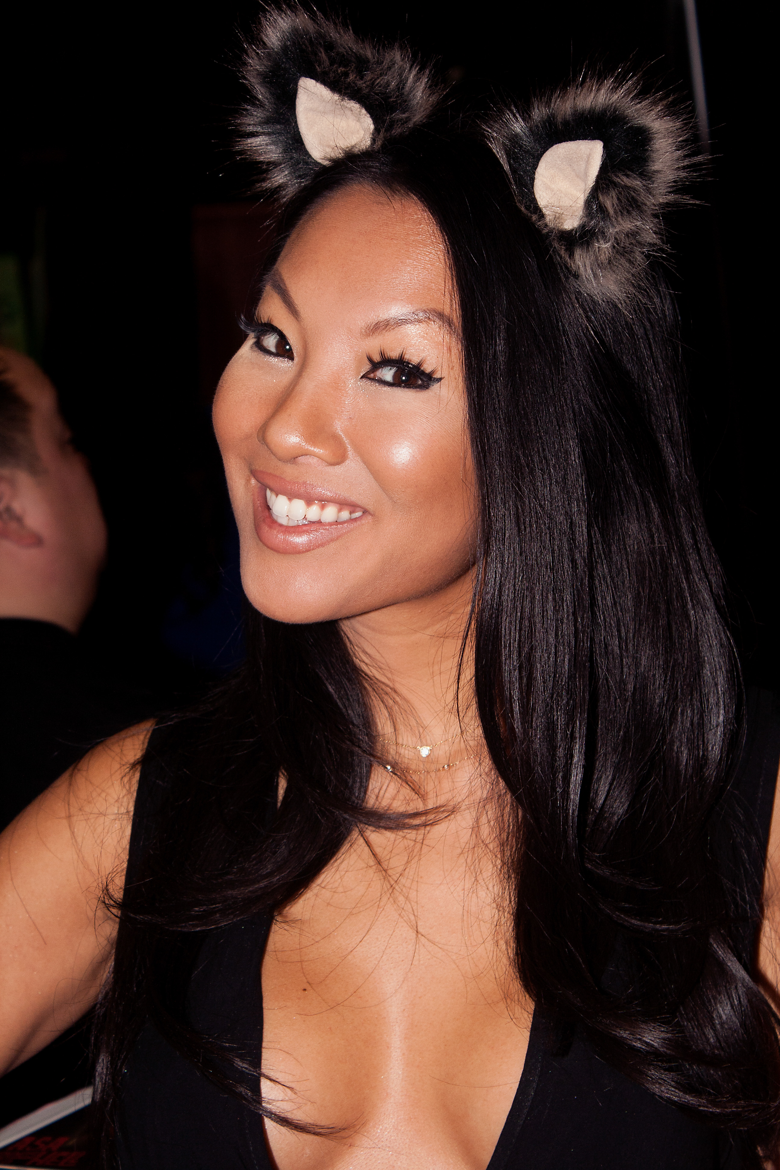 Exxxotica2016_0094bas